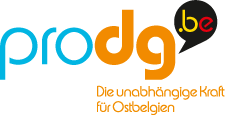 Logo von proDG